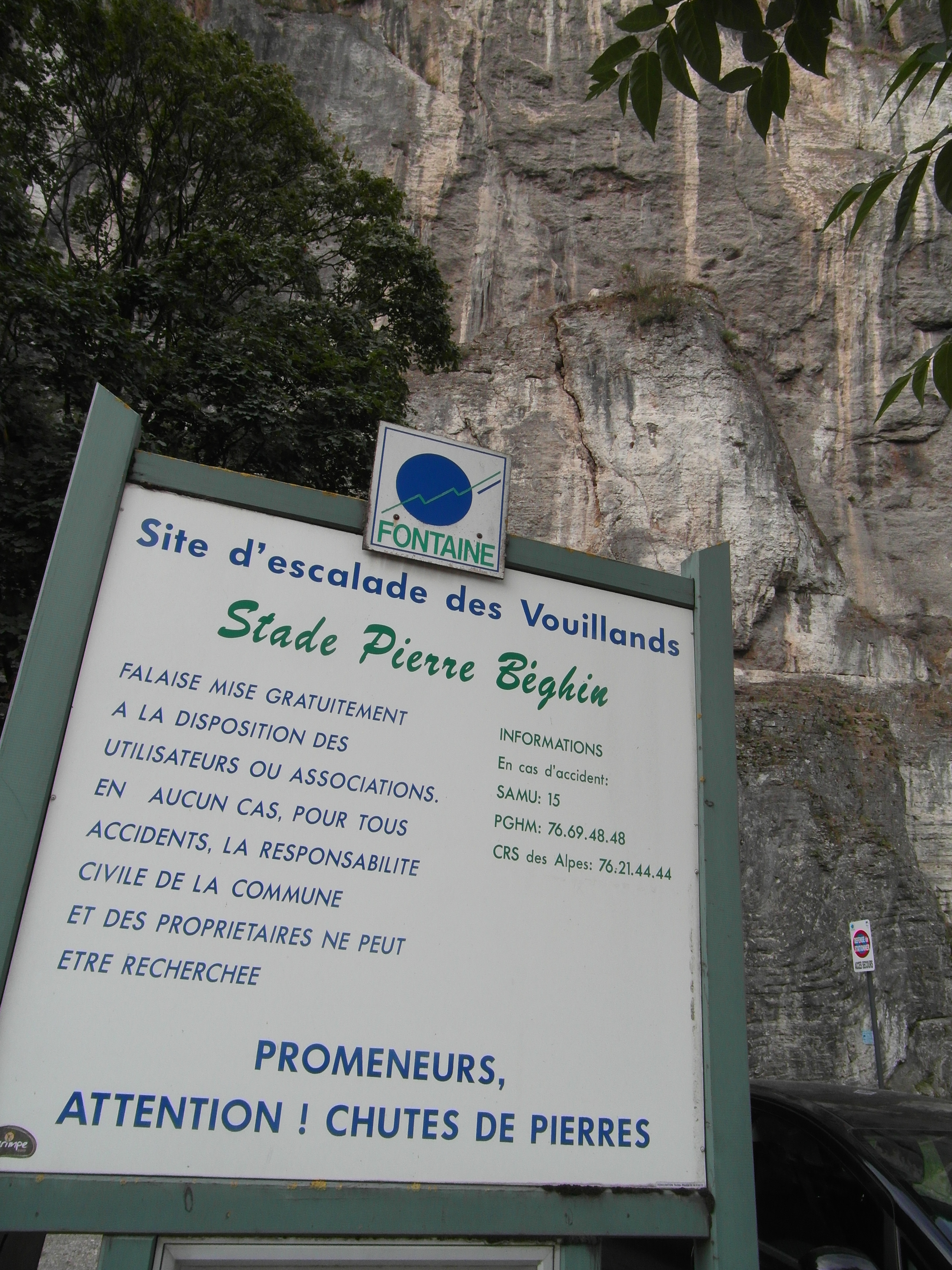 Site d'escalade